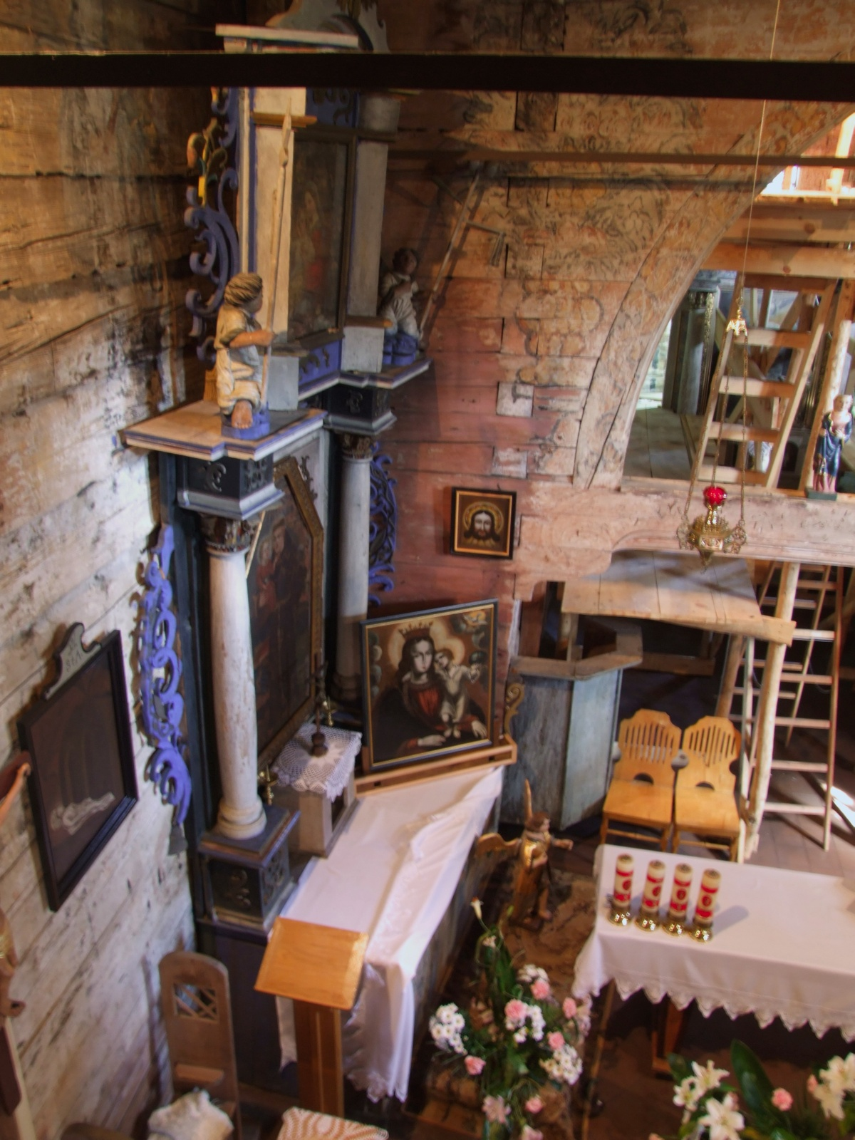 Muzeum parafialne w starym kościele w Iwkowej